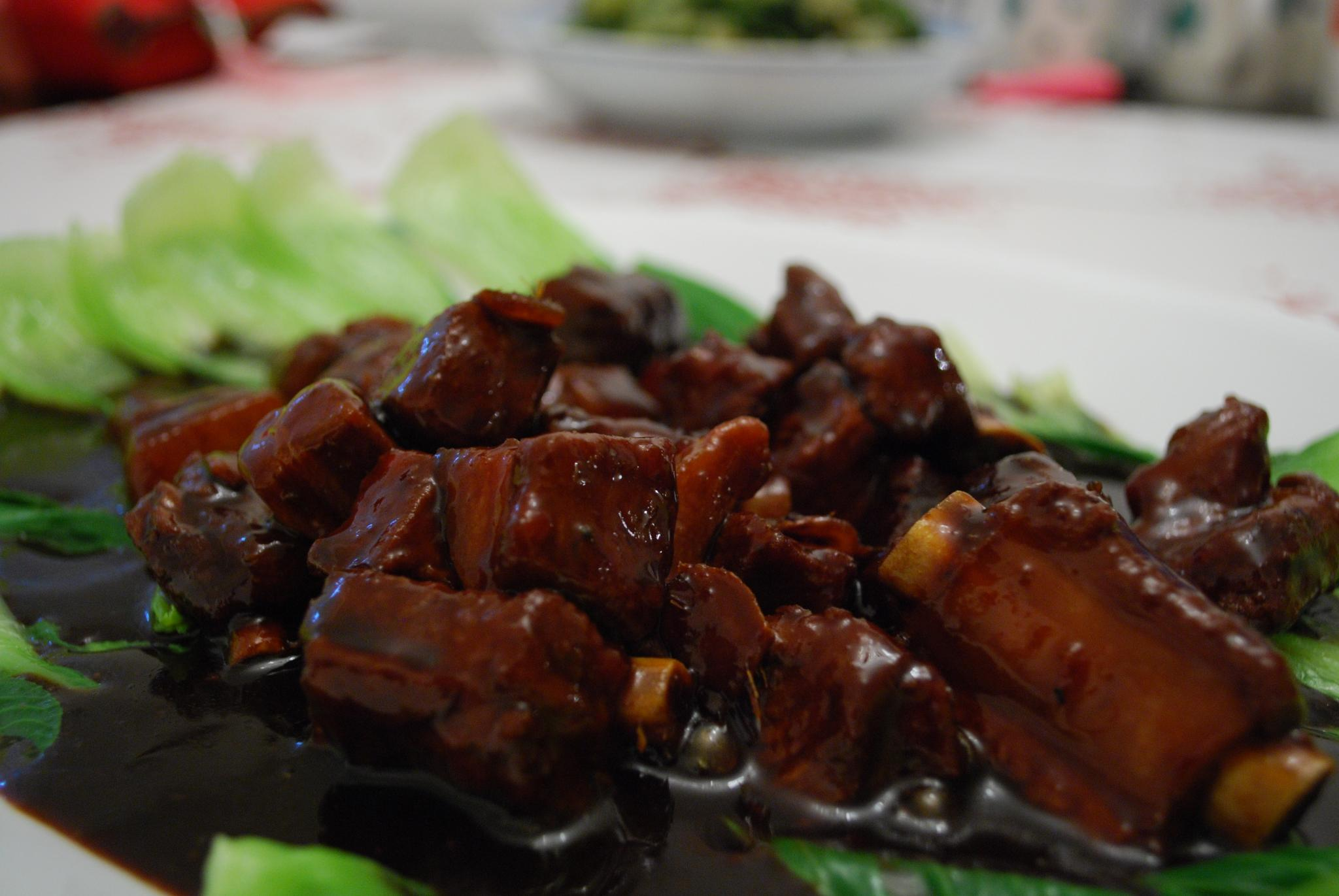 Michelle's 糖醋小排骨 Black Vinegar Pork